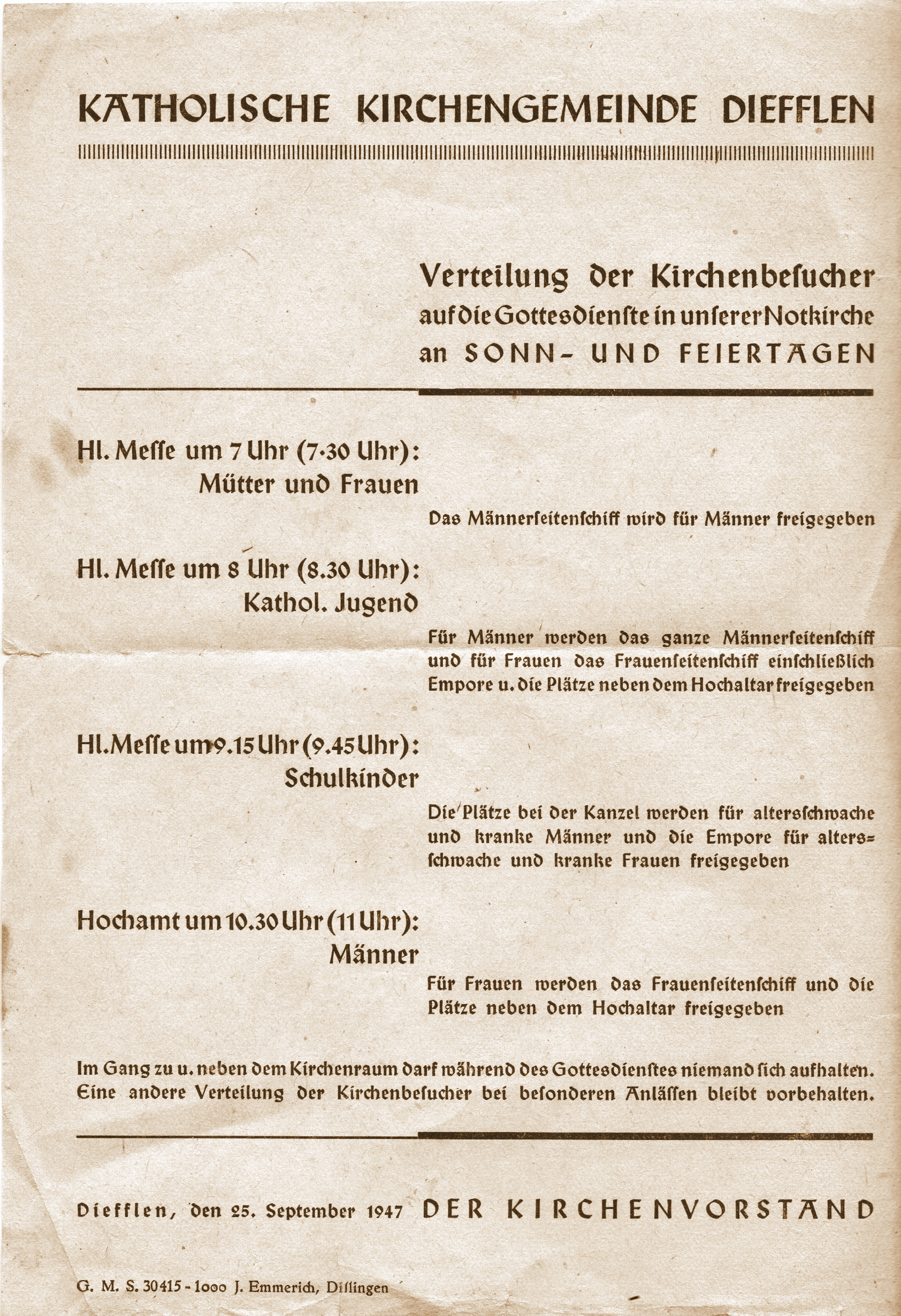 St. Josef und St. Wendelin (Diefflen), Verteilungsplan für die Kirchenbesucher aus dem Jahr 1947